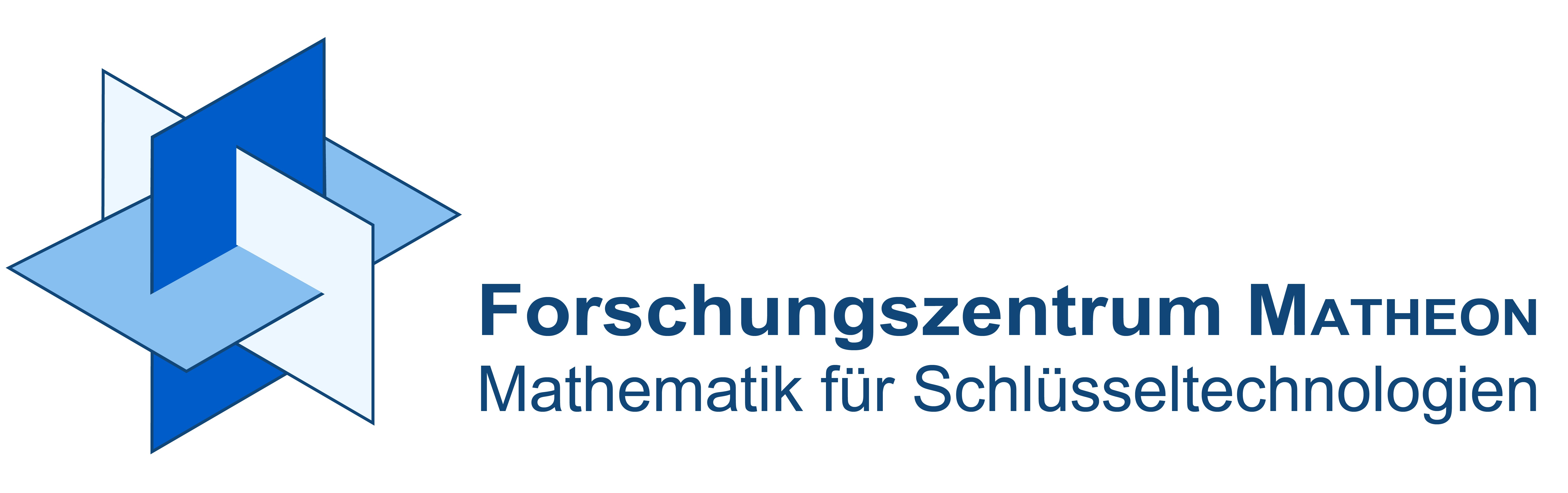 Matheon Logo bunt in Deutsch